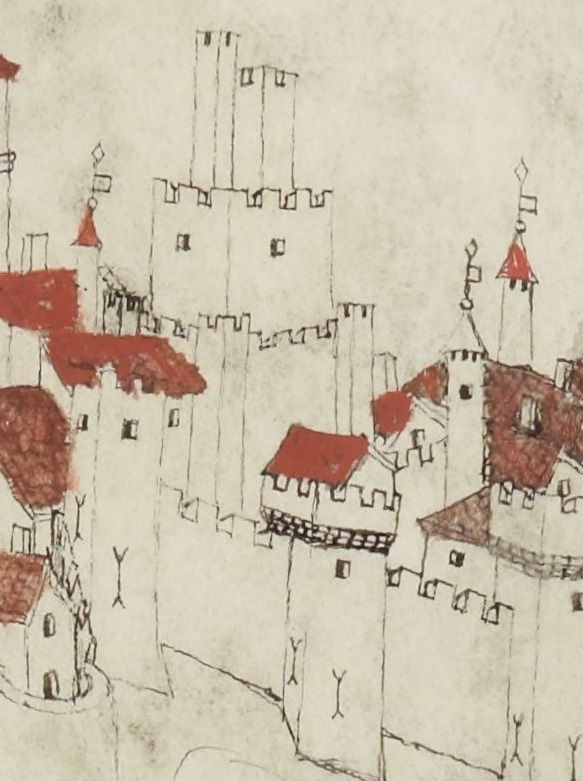 in Armorial d'Auvergne, pages présentant des chateaux, villes et blasons.